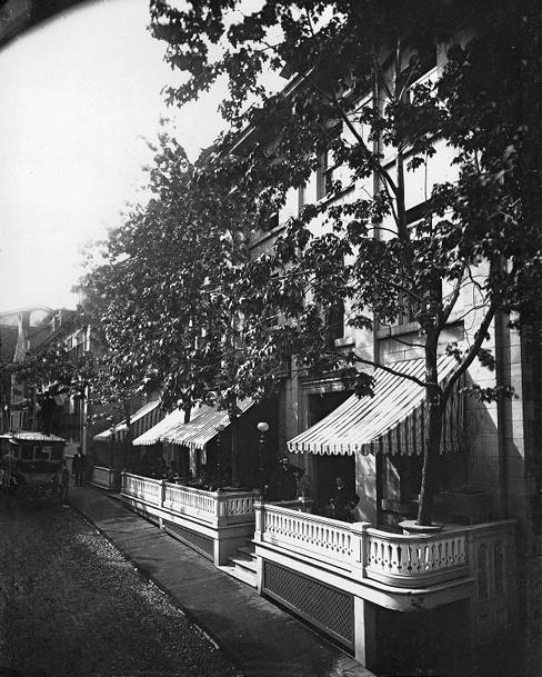 L'hôtel Richelieu, rue saint-Vincent, à Montréal (Québec), vers 1890. Cet édifice, 443 rue Saint-Vincent, fut construit en 1858. Il fut d'abord occupé par des bureaux d'avocats et des logements. Au milieu des années 1870, il est transformé en hôtel et intégré à l'hôtel Richelieu. Cet hôtel ferme en 1902. L'édifice est occupé pendant une dizaine d'années par le club Jacques-Cartier. Après deux incendies en 1912 et 1913, l'édifice est rénové et un quatrième étage lui est ajouté. De 1914 à 1924, il est occupé par les bureaux du journal Le Devoir. Il est ensuite acheté par le gouvernement du Québec, qui y installe la morgue de Montréal, jusqu'en 1969. Il est ensuite converti en restaurant et en bureaux. (Source : Site Vieux-Montréal, Ville de Montréal, Bureau du patrimoine, de la toponymie et de l'expertise, Service de la mise en valeur du territoire et du patrimoine, Coordination du Vieux-Montréal. Fiche de bâtiment 0040-56-6026-00.) La description de la photo par le musée McCord est : Photographie. Plaque sèche à la gélatine, 25 x 20 cm